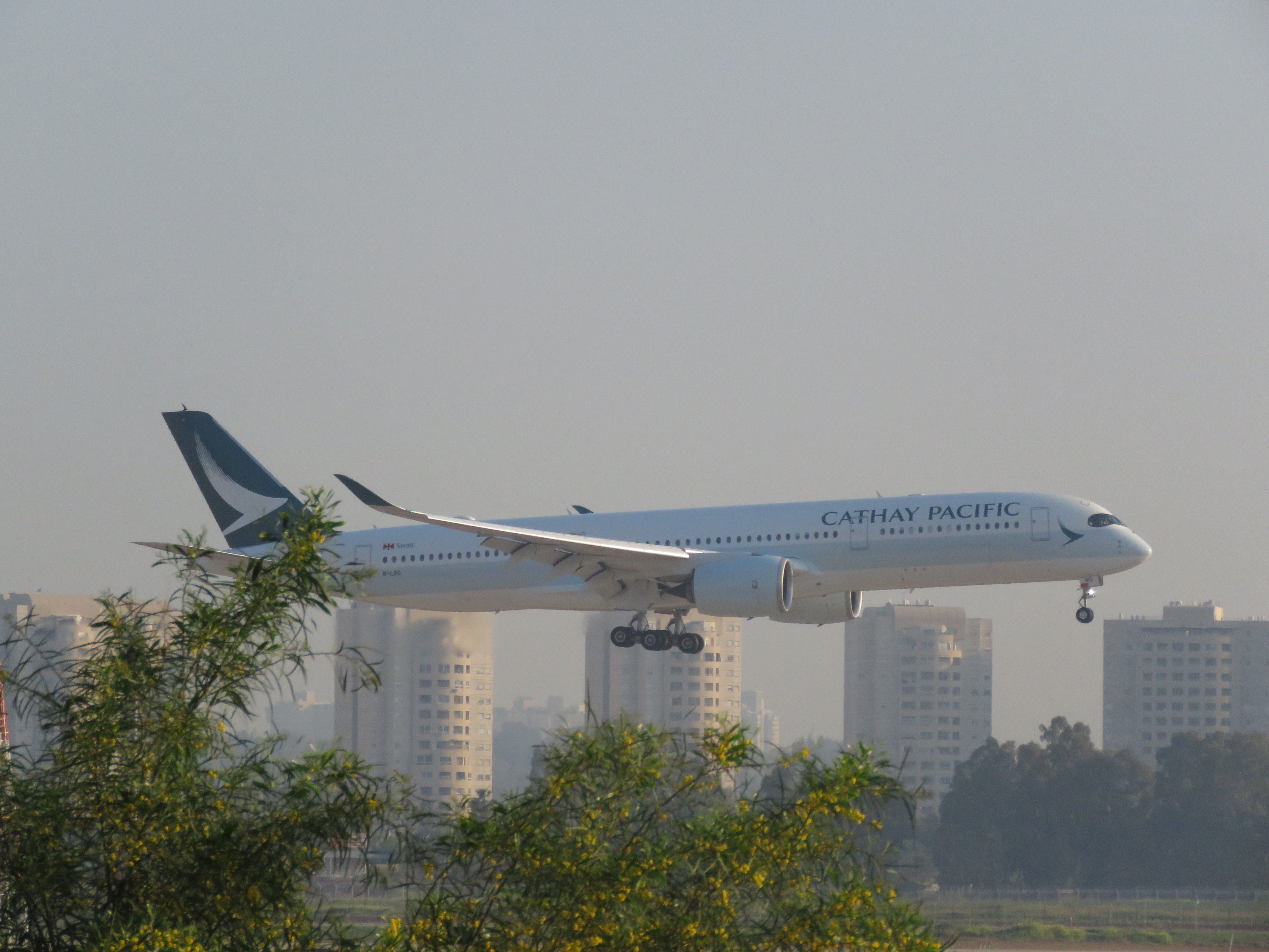 תמונה זו צולמה בשעה 7:53 רגעים לפני הנחיתה הראשונה של חברה זו בארץ, וכמו כן זו גם הנחיתה הראשונה של מטוס האיירבוס A350 בארץ.